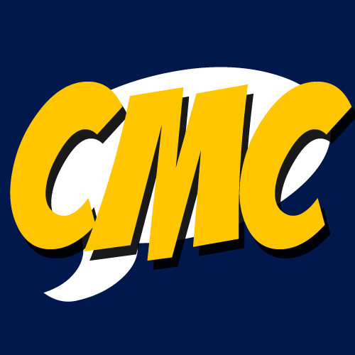 Logotipo web